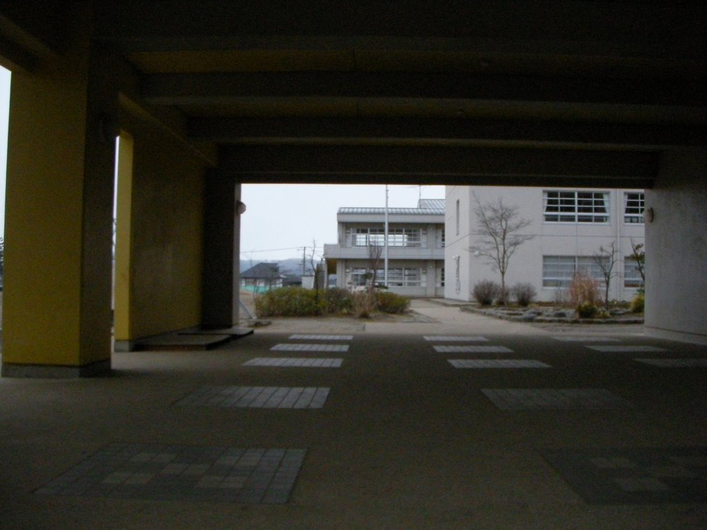 住吉台小学校